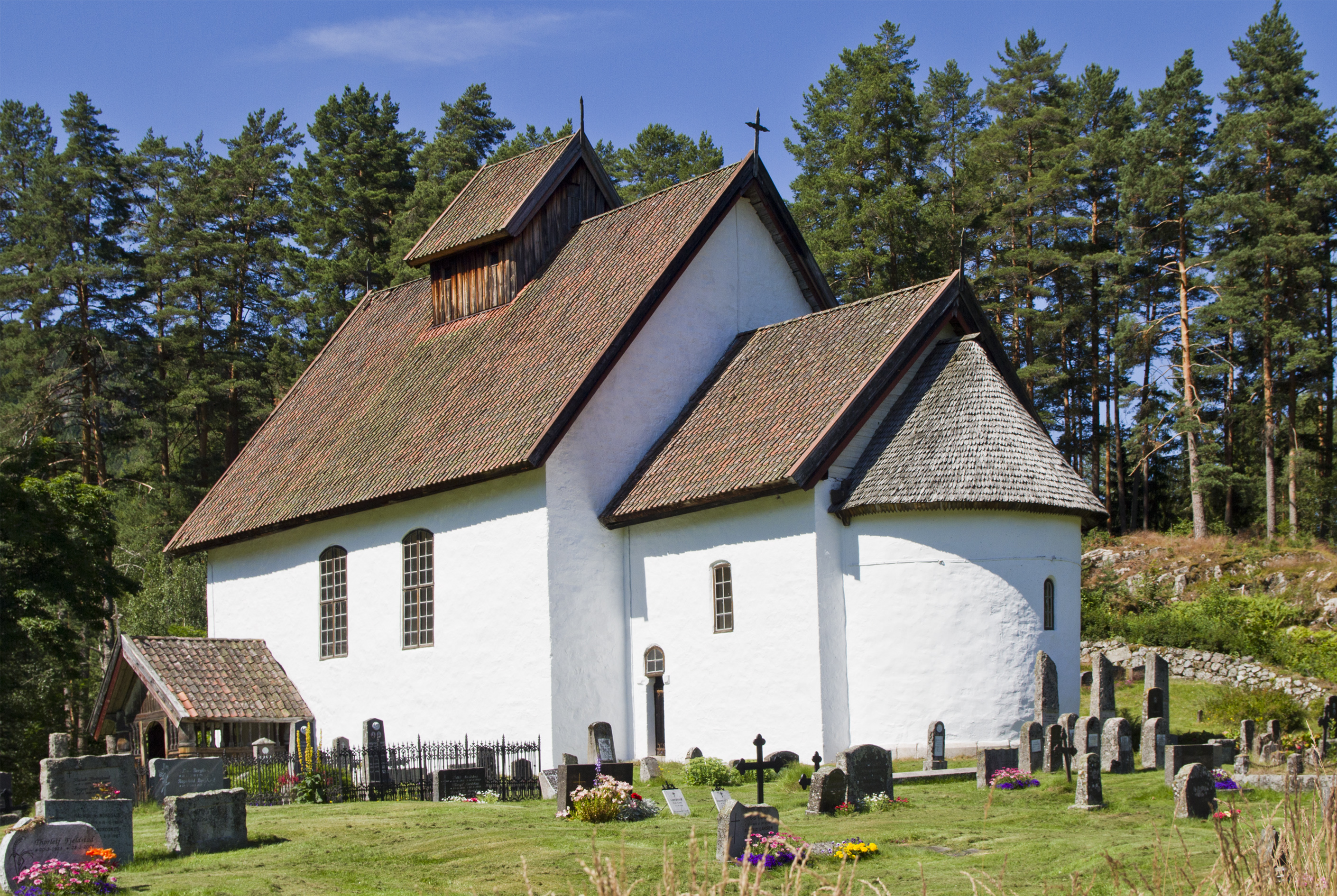 Kvitseid old church (1200 A.D.)